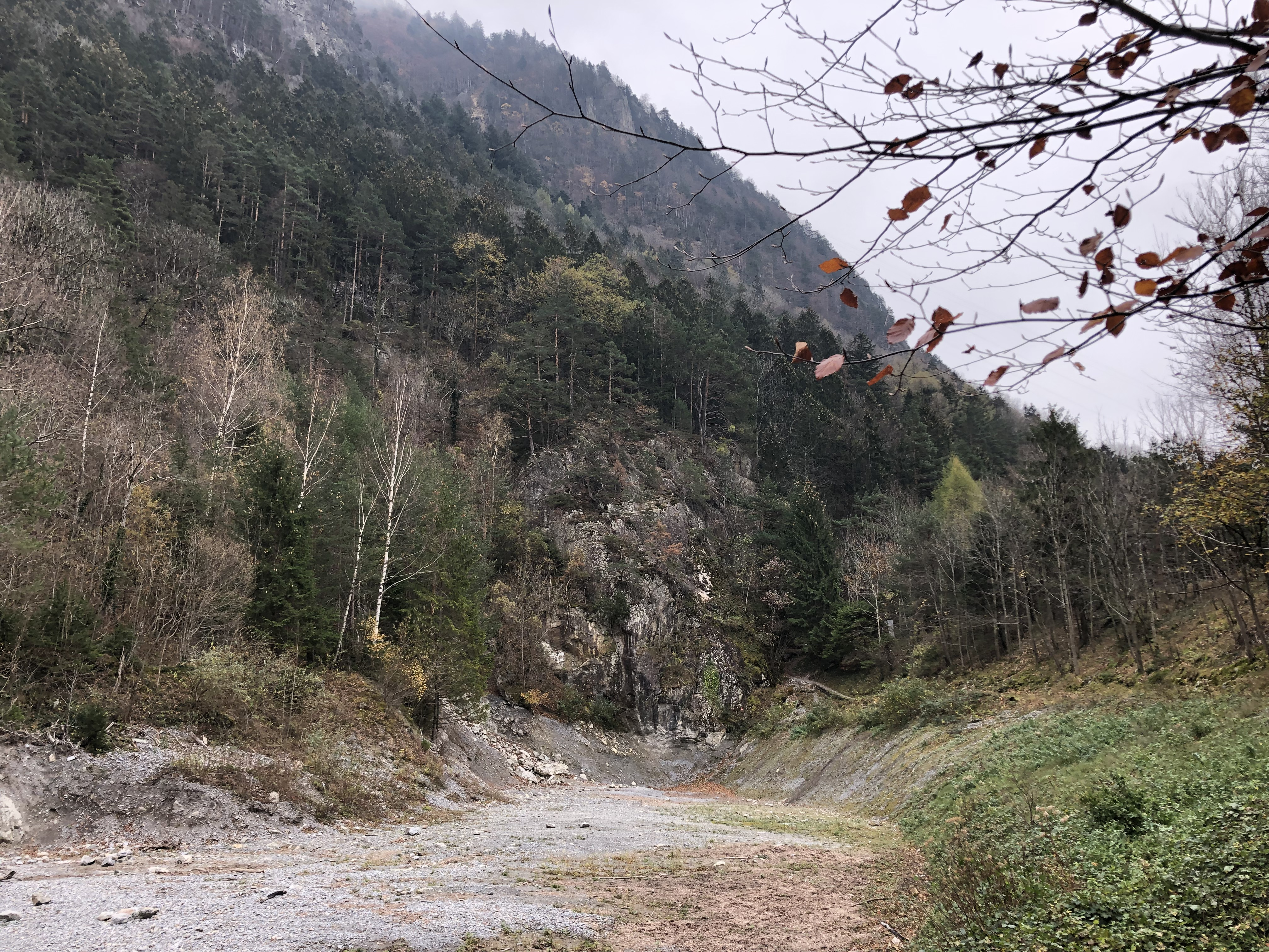 Goldschatz von Erstfeld Fundstelle